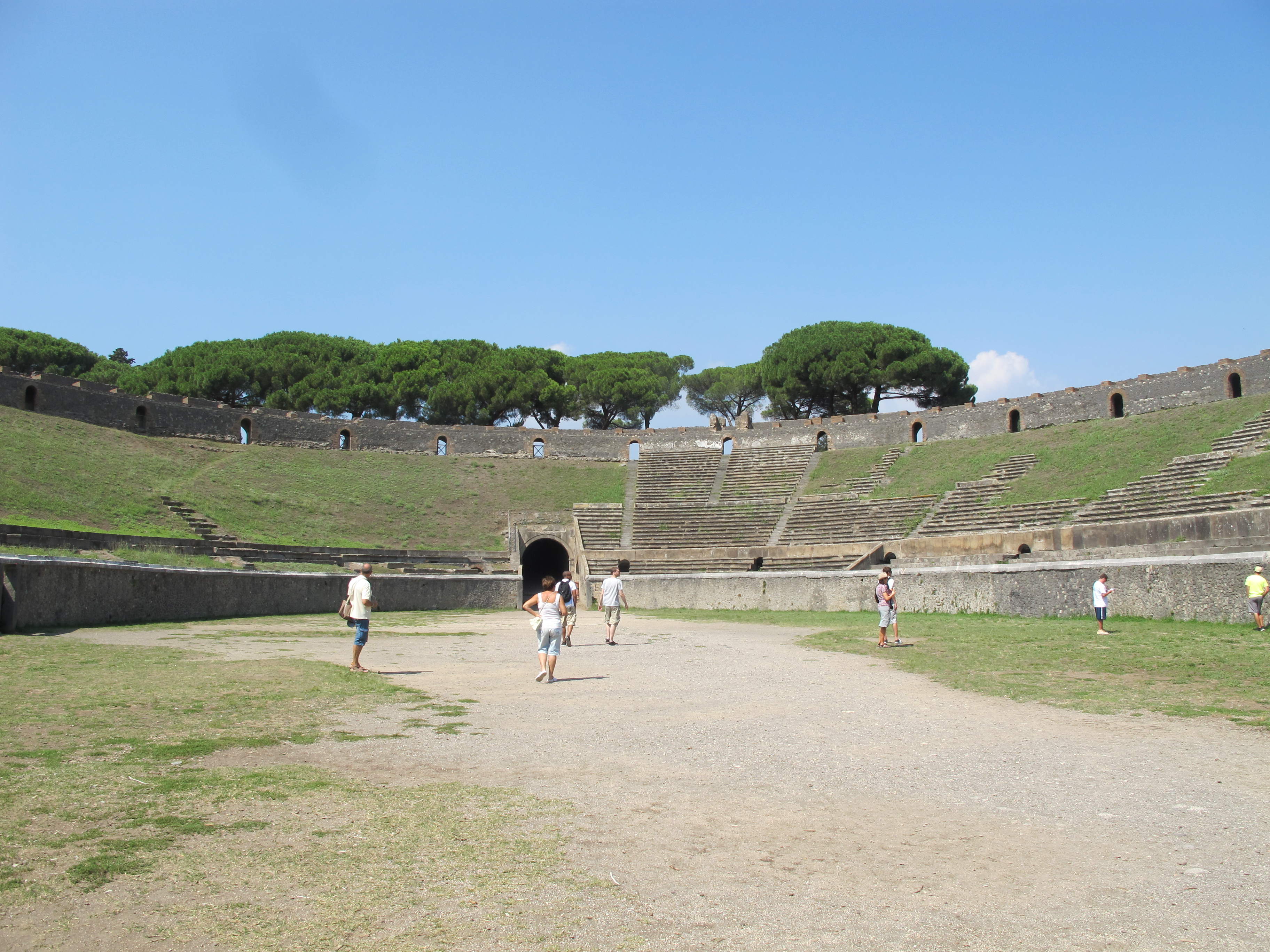 Pompei 2012